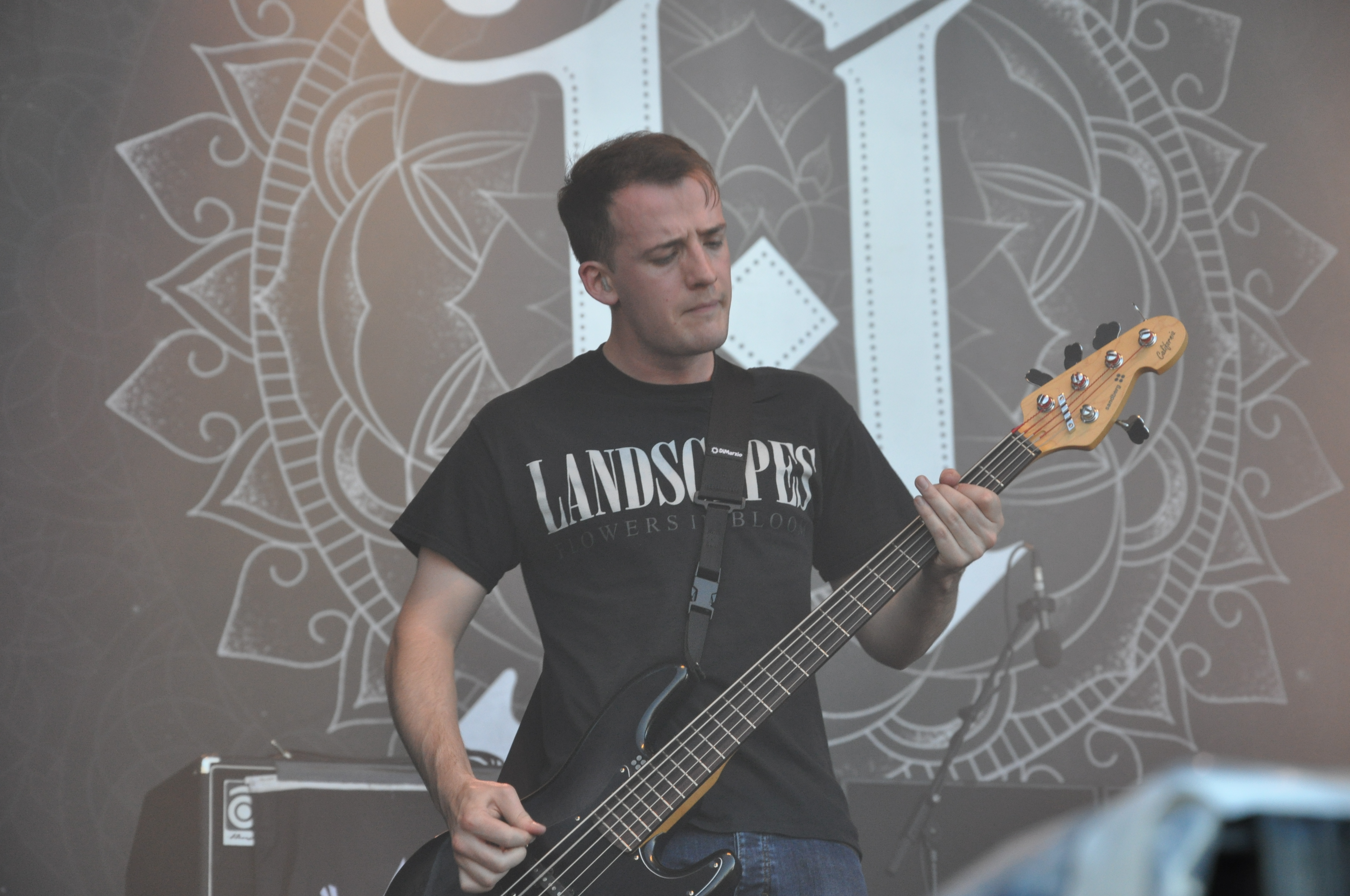 Architects auf der Clubstage bei Rock am Ring 2014